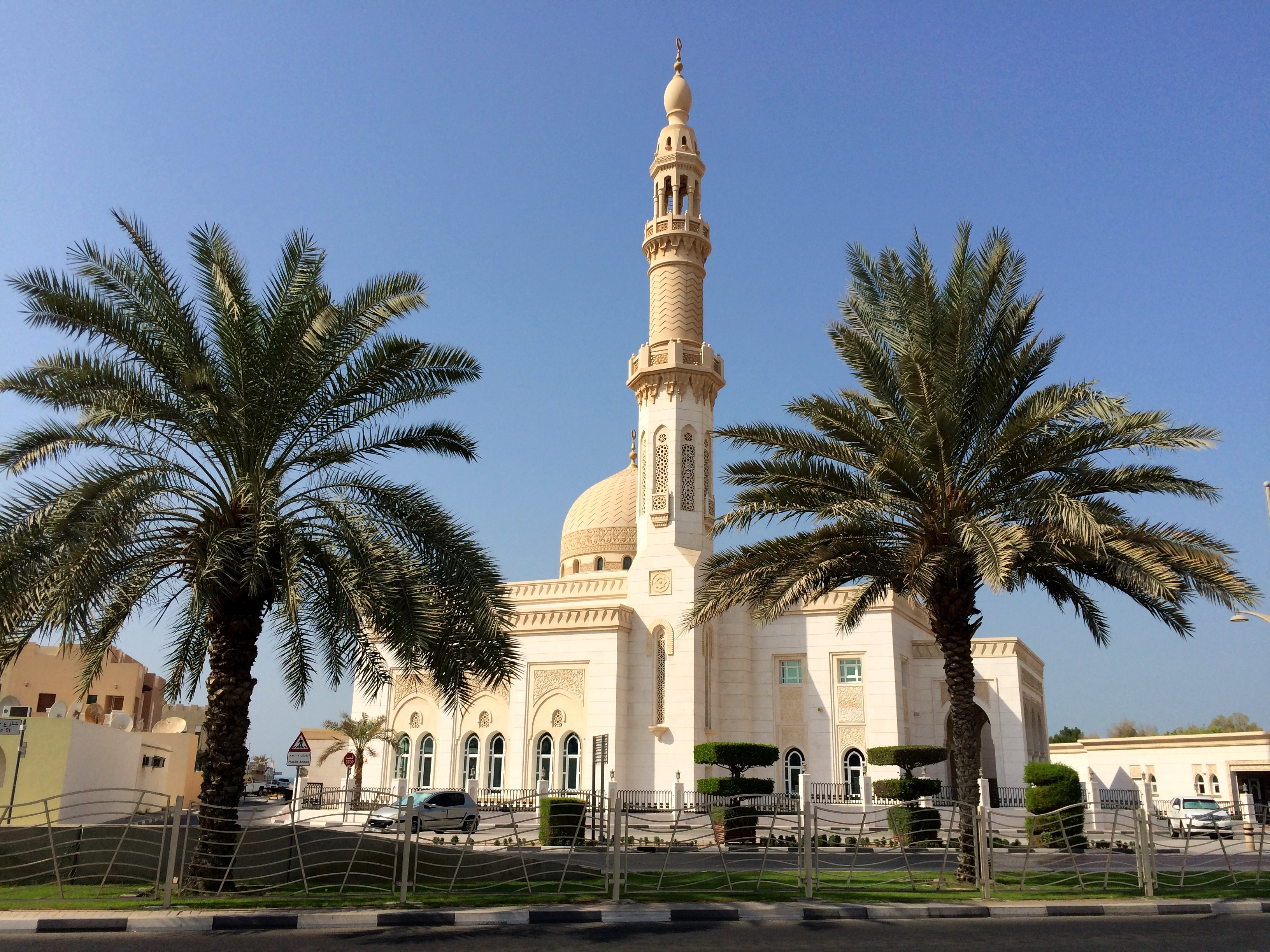 Marhaba Mosque